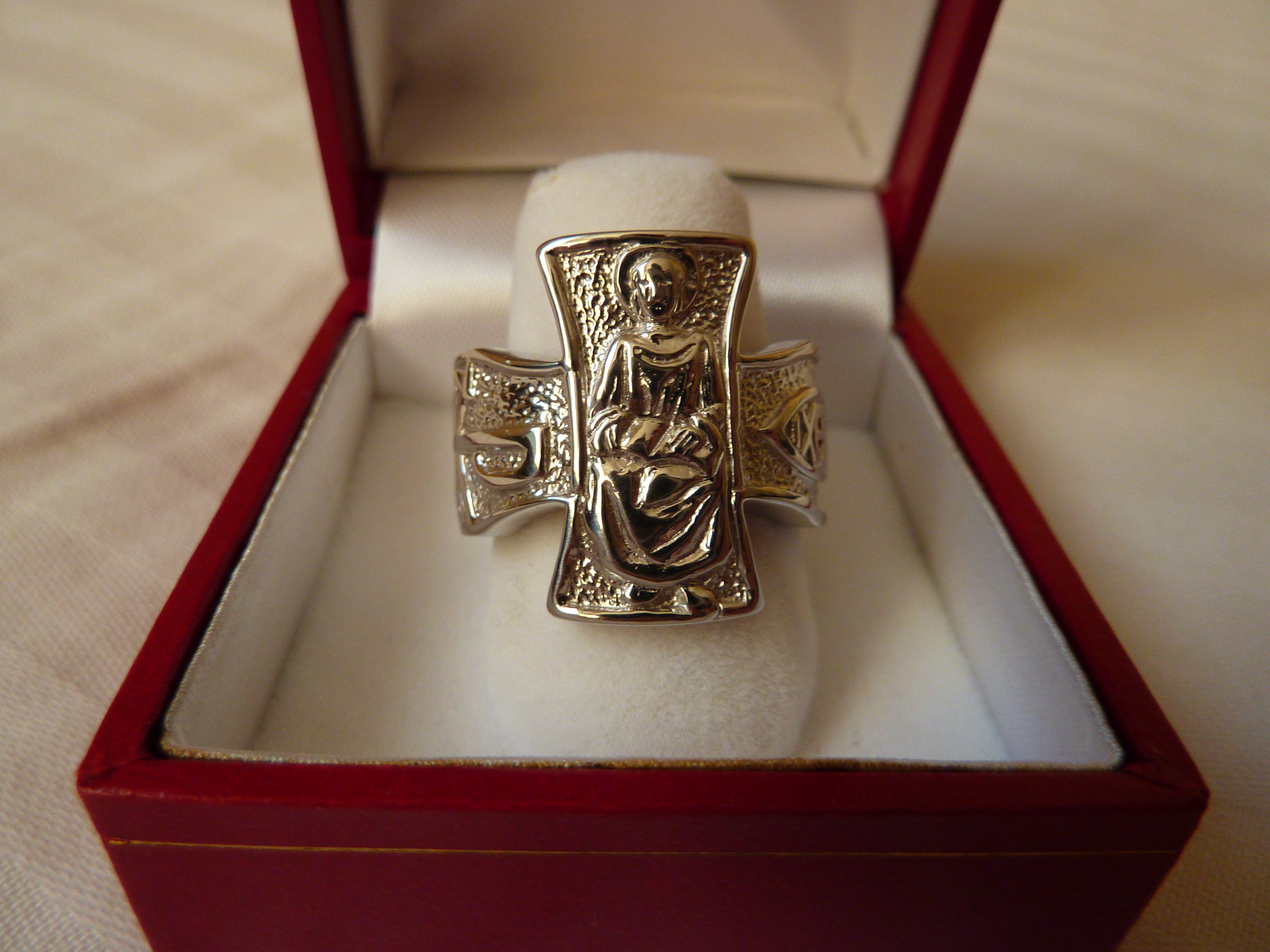 Anneau cruciforme inspiré de l'anneau du pape Jean-Paul II, Argent, Etats-Unis